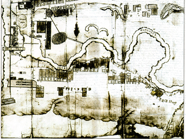 План Барнаульского сереброплавильного завода.